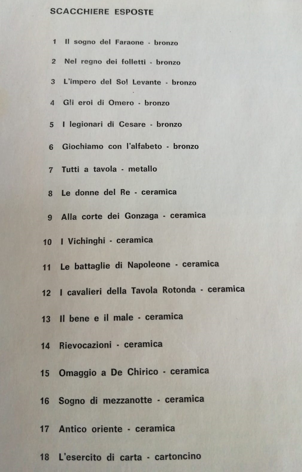 elenco scacchiere realizzate da piero cerato per la personale 1981